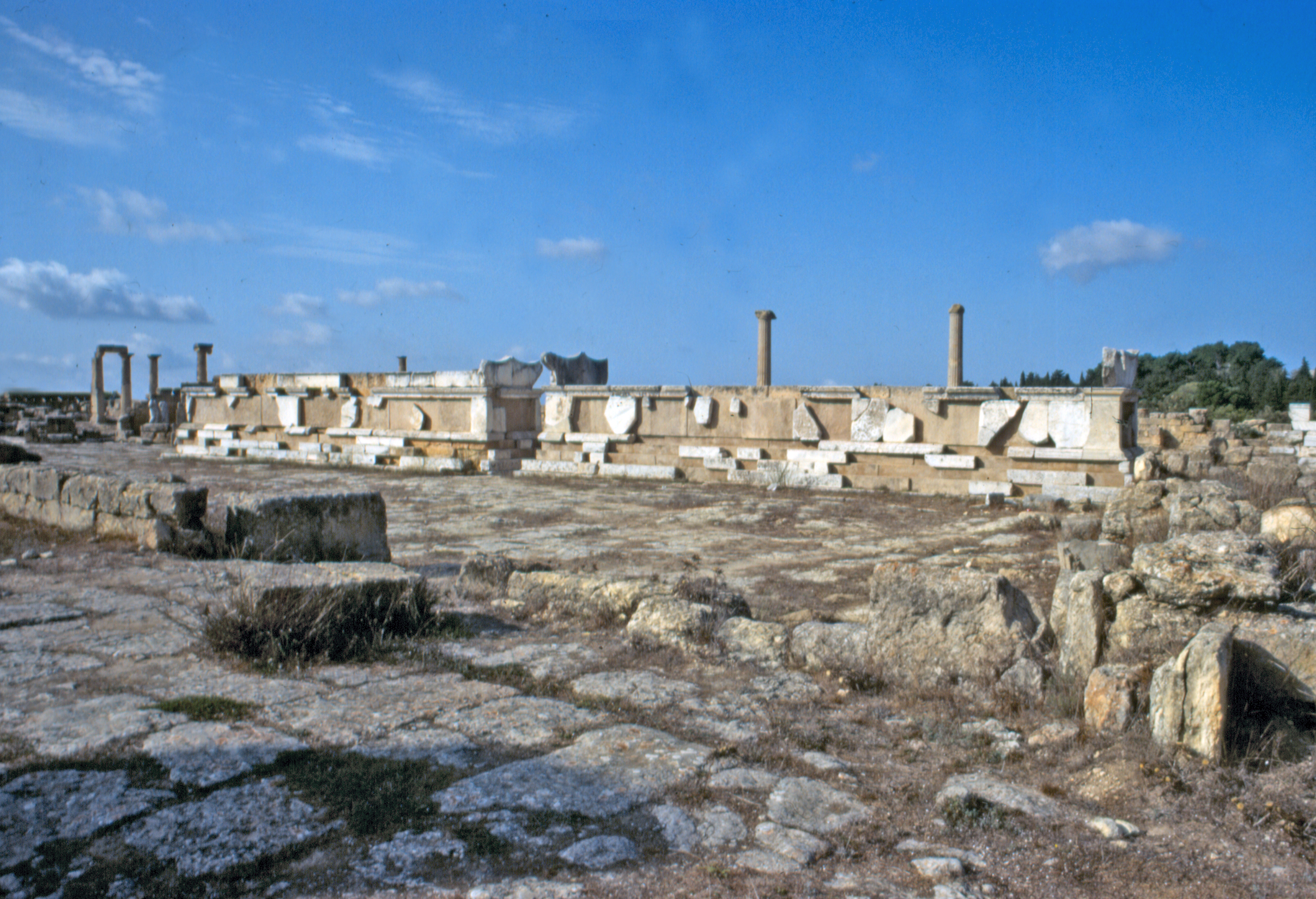 Libia, Cirene (sito archeologico), agorà, altari monumentali